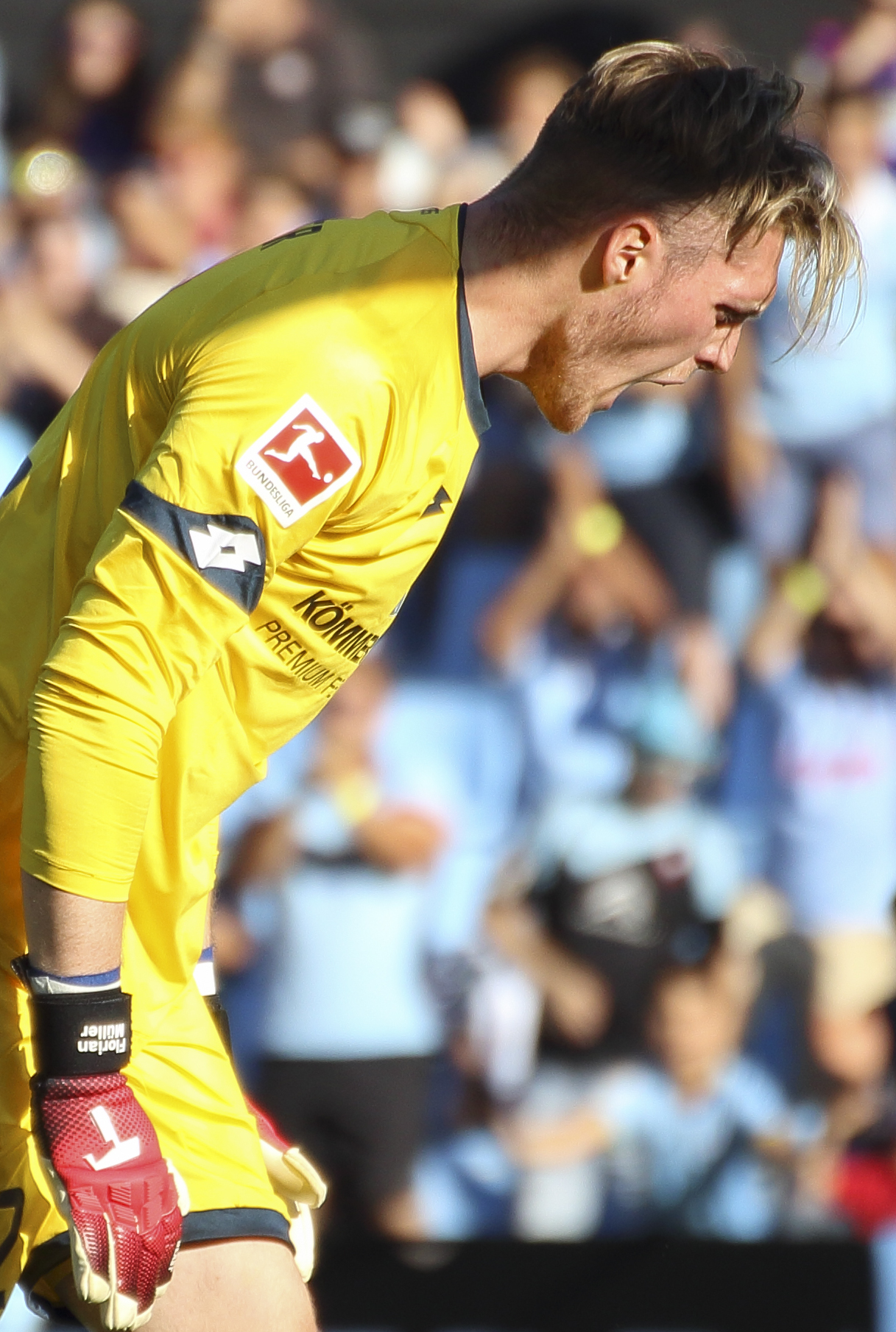 Presentación RC Celta - Temporada 18/19